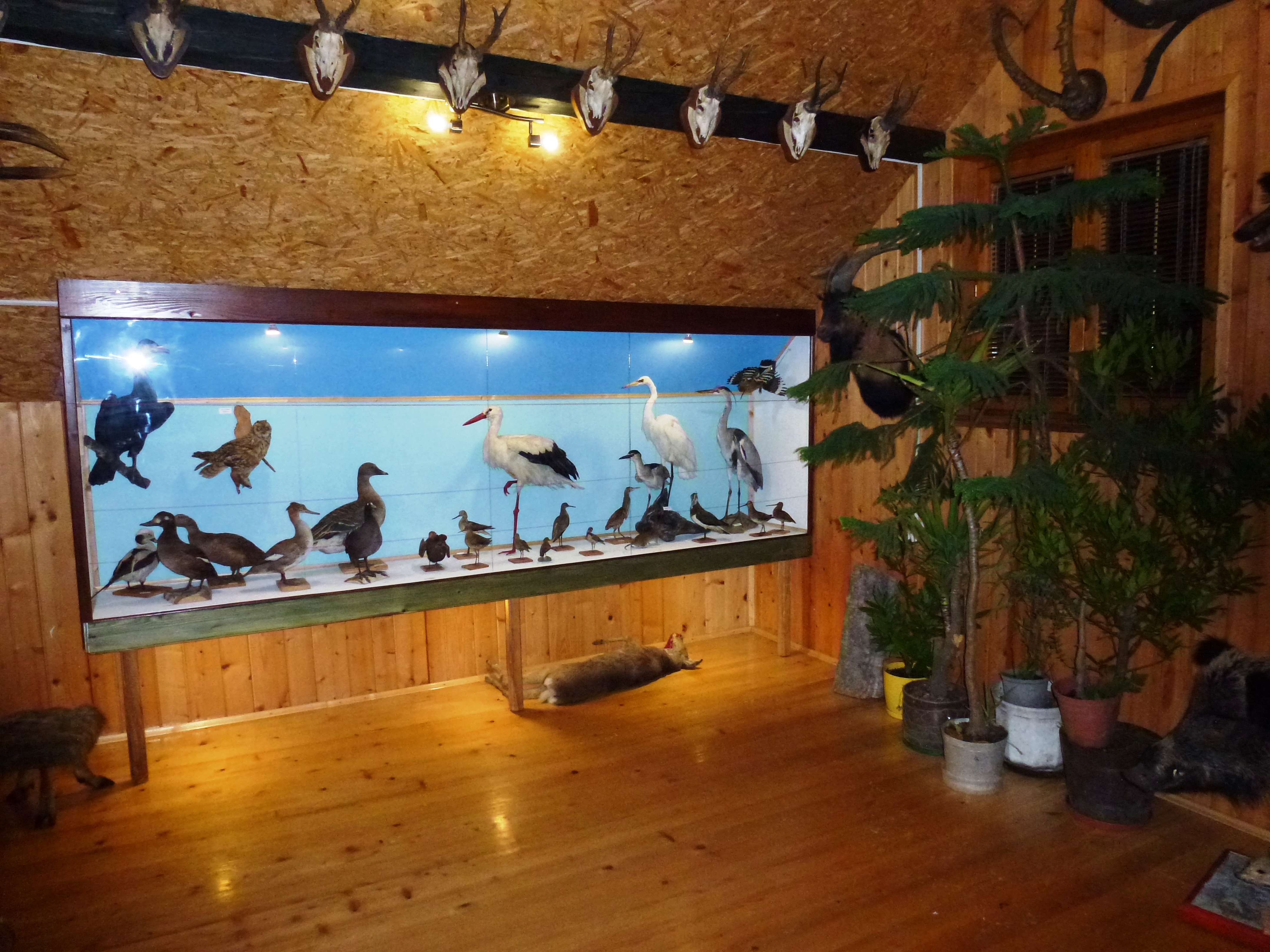 Jedna z gablot wystawy Tadeusza Olesia w Krościenku nad Dunajcem 2